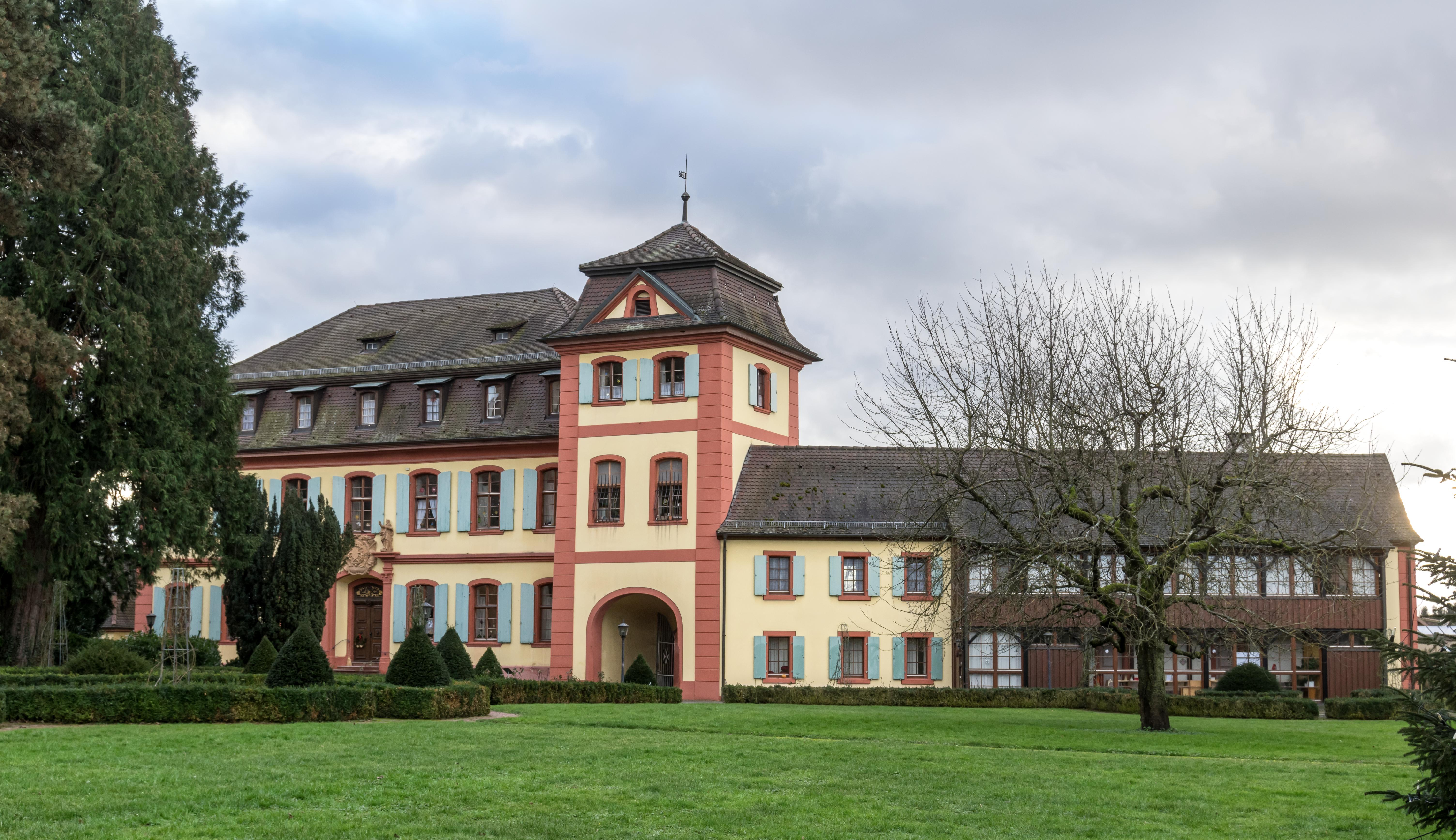 Bilder aus Heitersheim Das ehemalige Malteserschloss Heitersheim, jetzt im Besitz des Ordens der barmherzigen Schwestern vom Hl. Vinzenz von Paul Kanzleigebäude mit Torturm